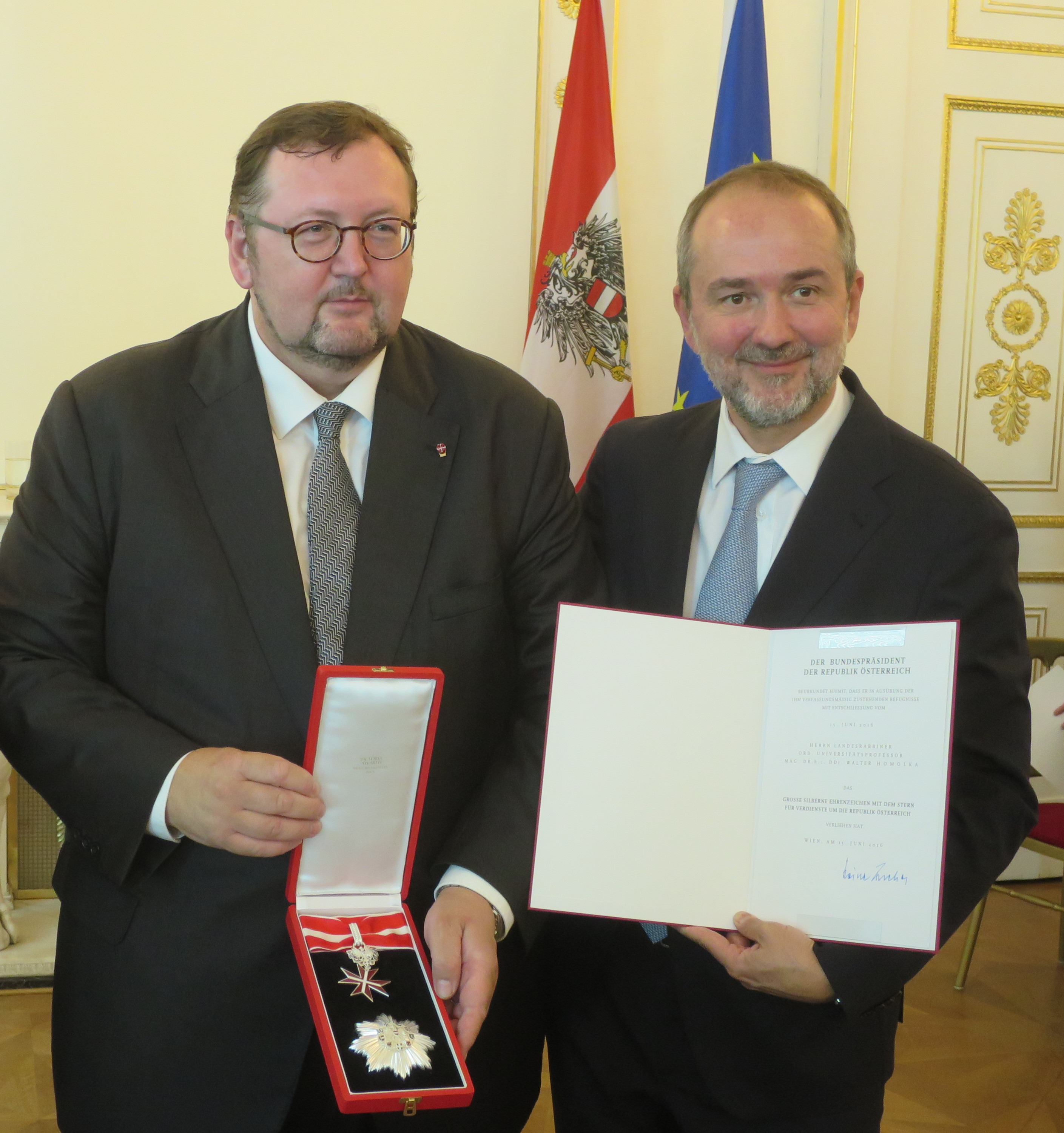 Walter Homolka (links) und Bundesminister Thomas Drozda im Bundeskanzleramt Wien. Verleihung des Großen Silbernen Ehrenzeichens mit dem Stern der Republik Österreich